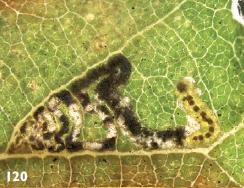 Ectoedemia rufifrontella larva